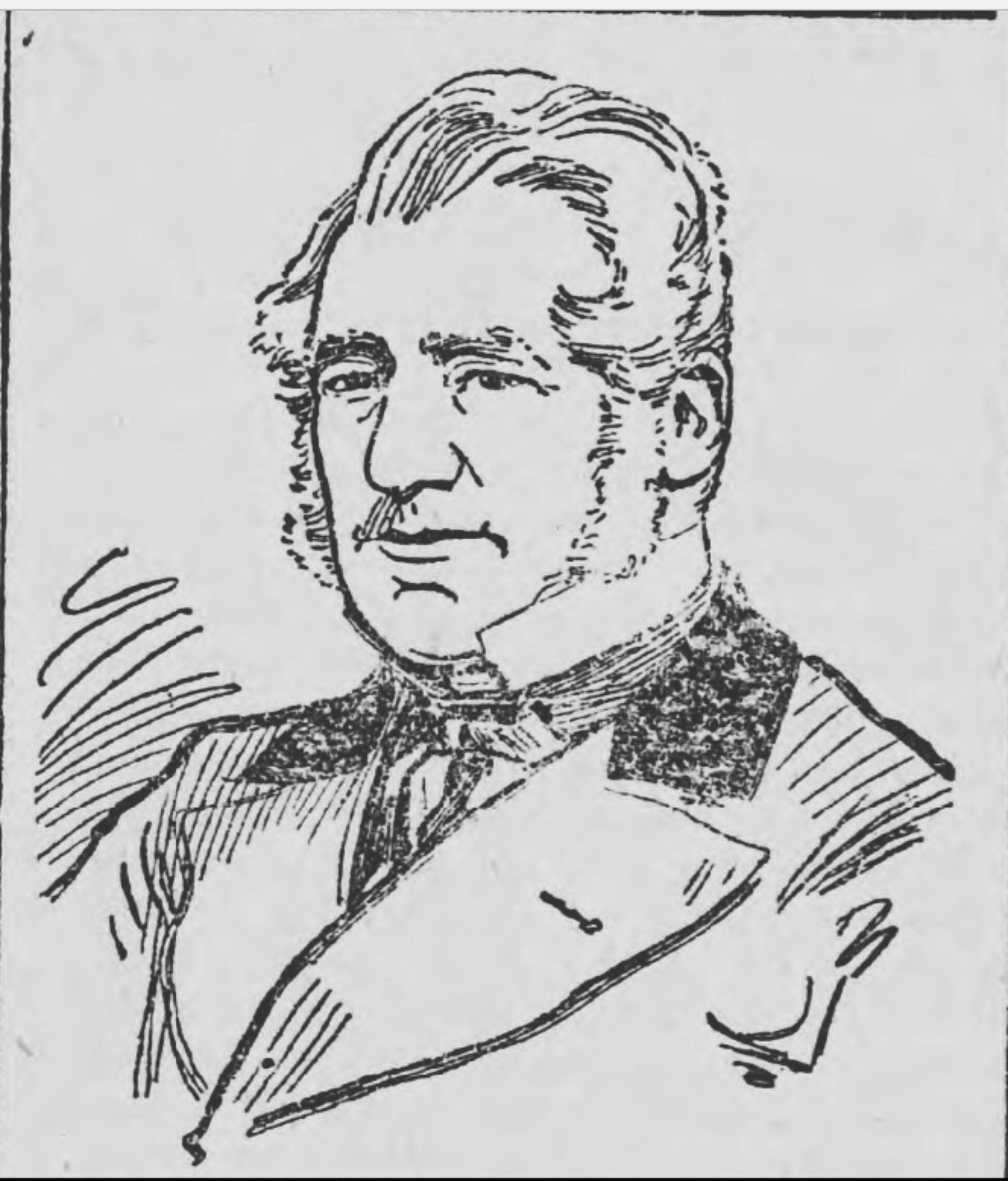 Charles Herbert James AS